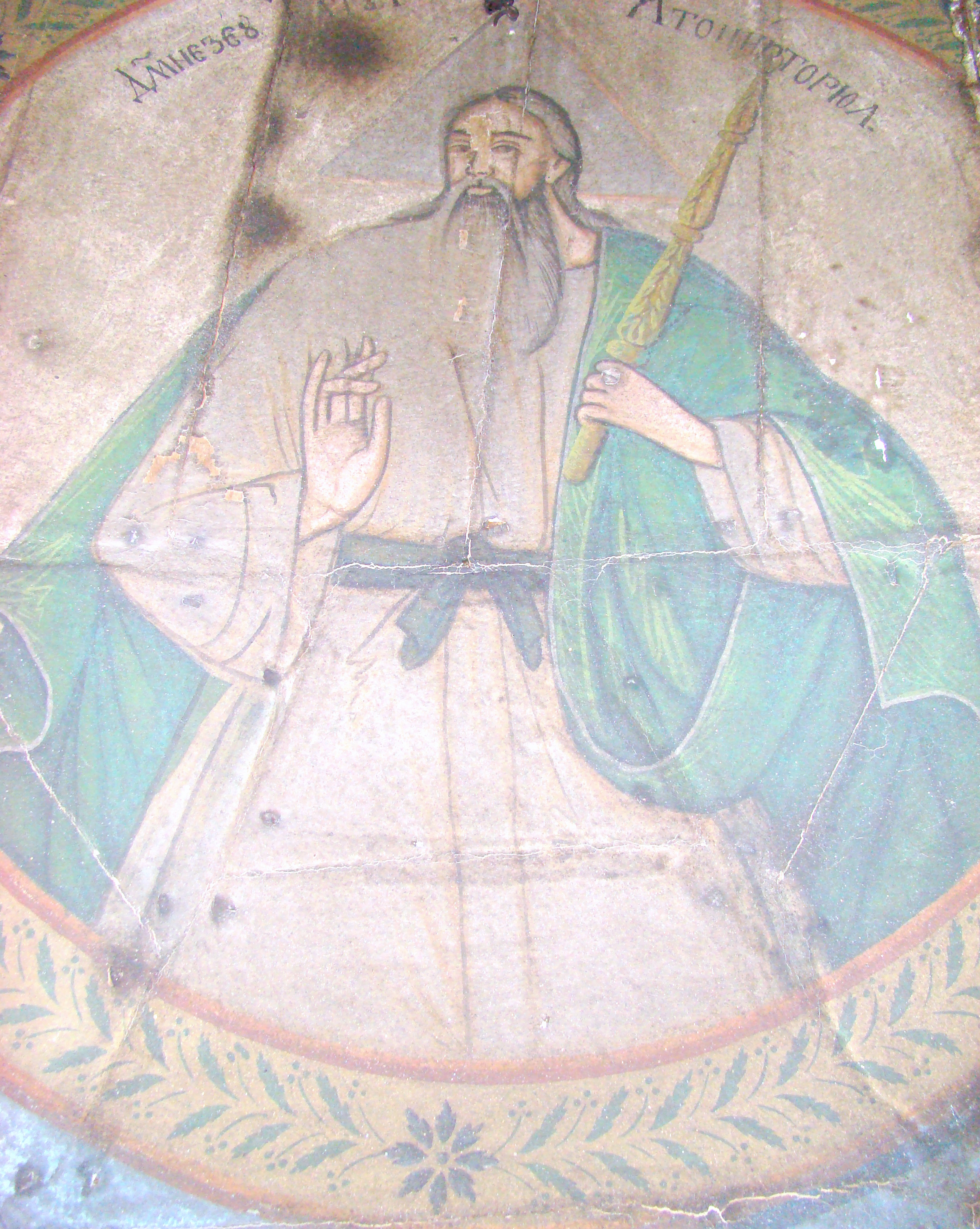 Biserica de lemn "Buna Vestire" din Ciungani, județul Hunedoara